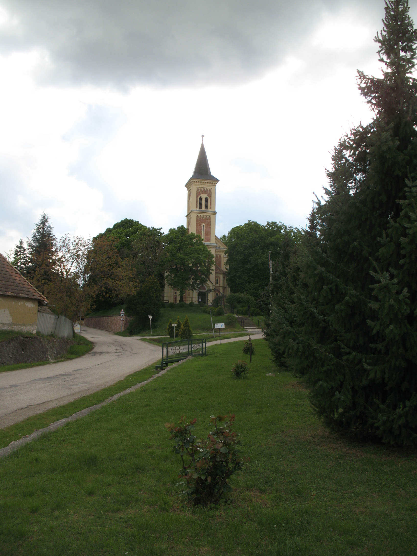 Dunaszentmiklós